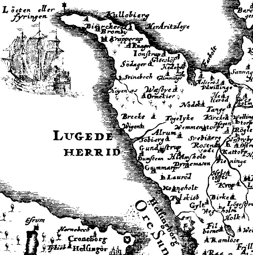 Kullen på Jens Husmans danske Skånekort fra 1677. Se evt. større version her